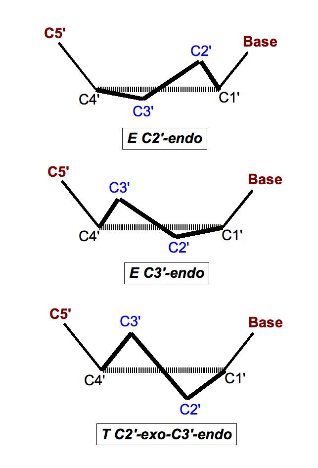 posibilidades de plegamiento del anillo de la ribosa: E C2'-endo, E C3'-endo, T C2'-exo-C3'-endo; sugar puckering modes.